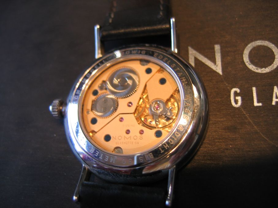 NOMOS Armbanduhr, Ausführung vor 2005 noch mir ETA Werk, Modell Ludwig Rückseite mit Glasboden